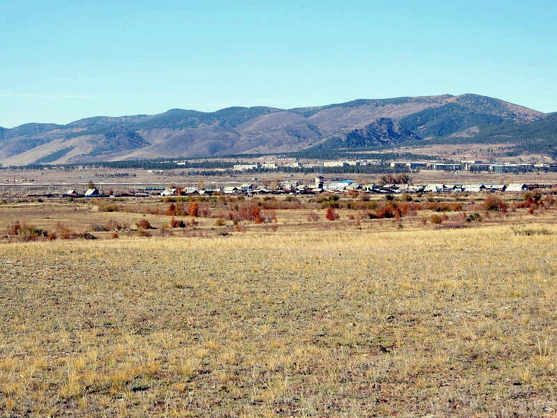 Станция Загустай. За ней выше - посёлок Заозёрный (5-этажные ДОСы). На фоне Хамбинского хребта Хамар-Дабана.